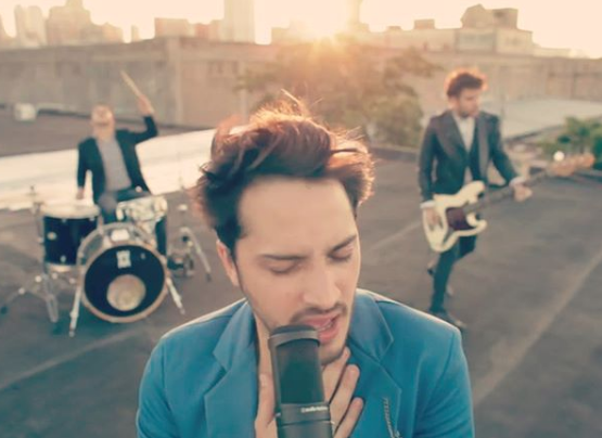 foto video esto es amor